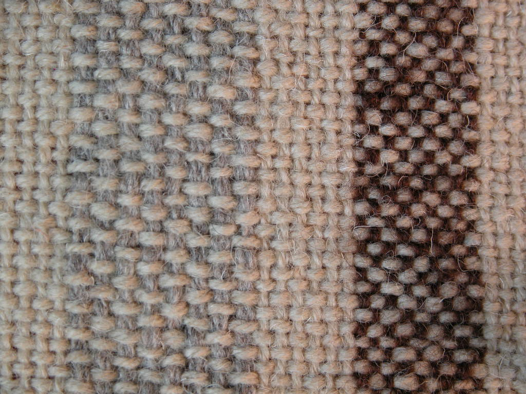 foto mia personale, navetta mette il filo di trama nel passo, 2007. Licensing Categoria:Immagini sulla tessitura